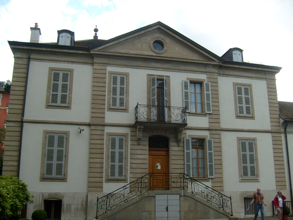 Maison Les Délices, siège du Musée Voltaire à Genève